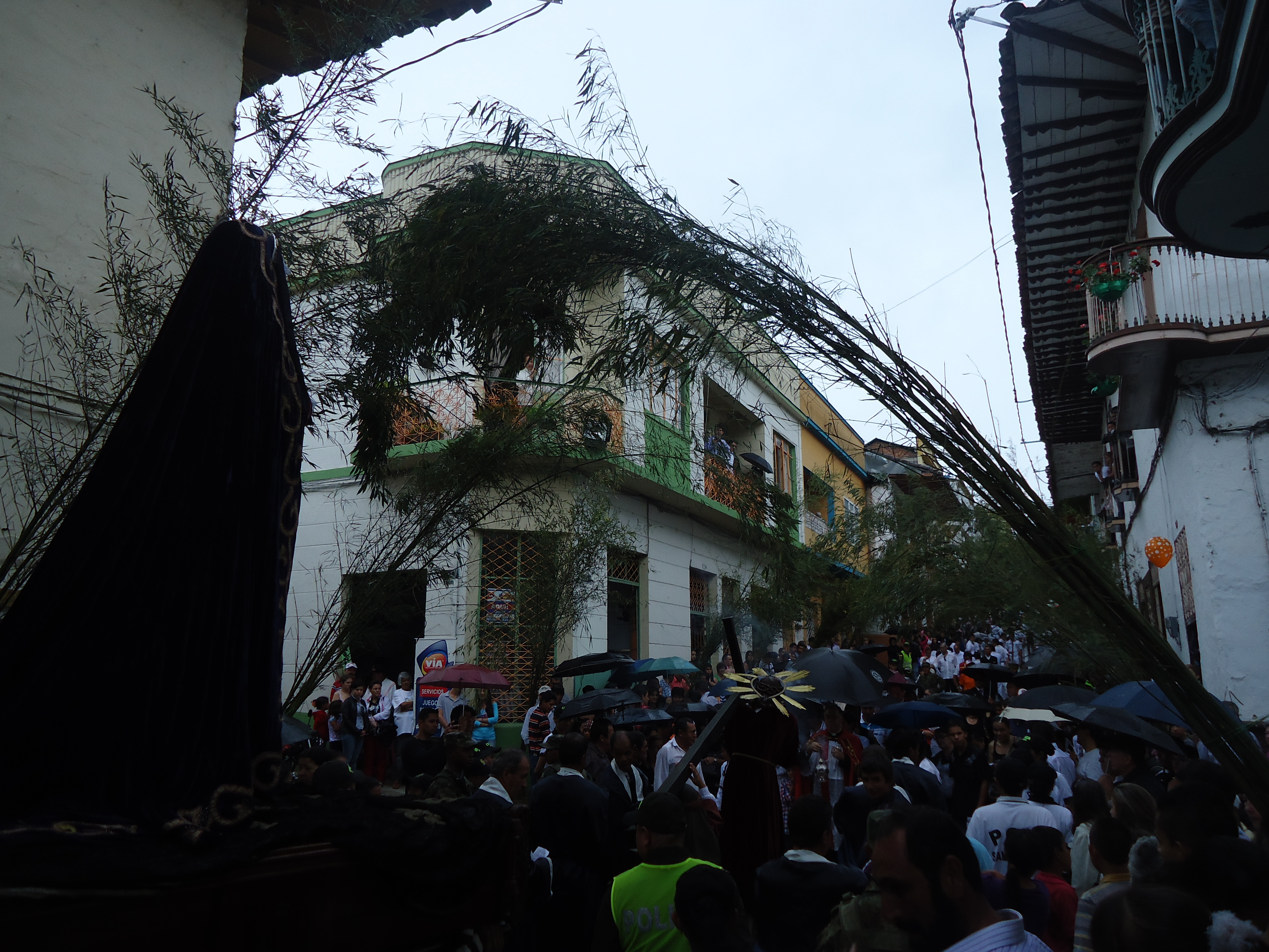 Viacrucis en salamina caldas